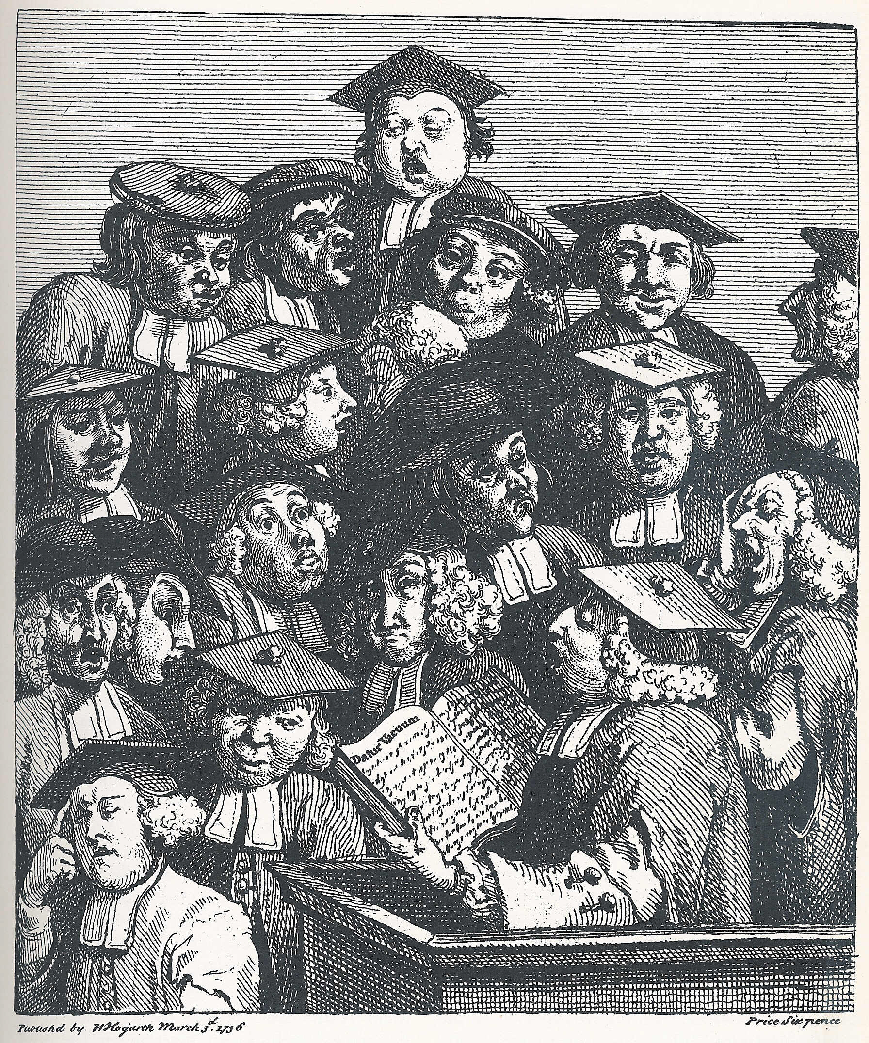 William Hogarth, "Studenten bei der Vorlesung", publiziert am 3. März 1736, Karikatur einer rechtswissenschaftlichen Vorlesung am Jesus College in Oxford, die Studenten werden durch ihre Mützen in ihrer sozialen Stellung unterschieden, die eckigen Kopfbedeckungen (mortarboards) kennzeichnen die Stipendiaten, runde Mützen tragen die Selbstzahler oder diejenigen, deren Stipendium mit Auflagen verbunden ist. Rechte abgelaufen, Public Domain